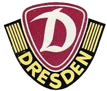 Scan eines Dynamo Dresden Wappens von einem Programmheft, was in den 1980ern erschienen ist. Daher ist die Wualität nicht so besonders und weicht gering vom Original ab.